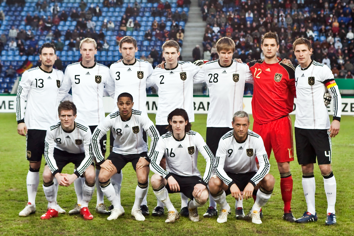 Die Deutsche U-21 Fußballnationalmannschaft am 2. März 2010 vor dem Länderspiel gegen Island. obere Reihe, v.l.n.r.: Timo Gebhart, Felix Bastians, Stefan Reinartz, Daniel Schwaab, Holger Badstuber, Sven Ulreich, Benedikt Höwedes untere Reihe, v.l.n.r.: André Schürrle, Sidney Sam, Sebastian Rudy, Julian Schieber